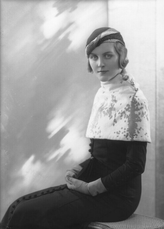 Diana Mitford, 27 janvier 1932